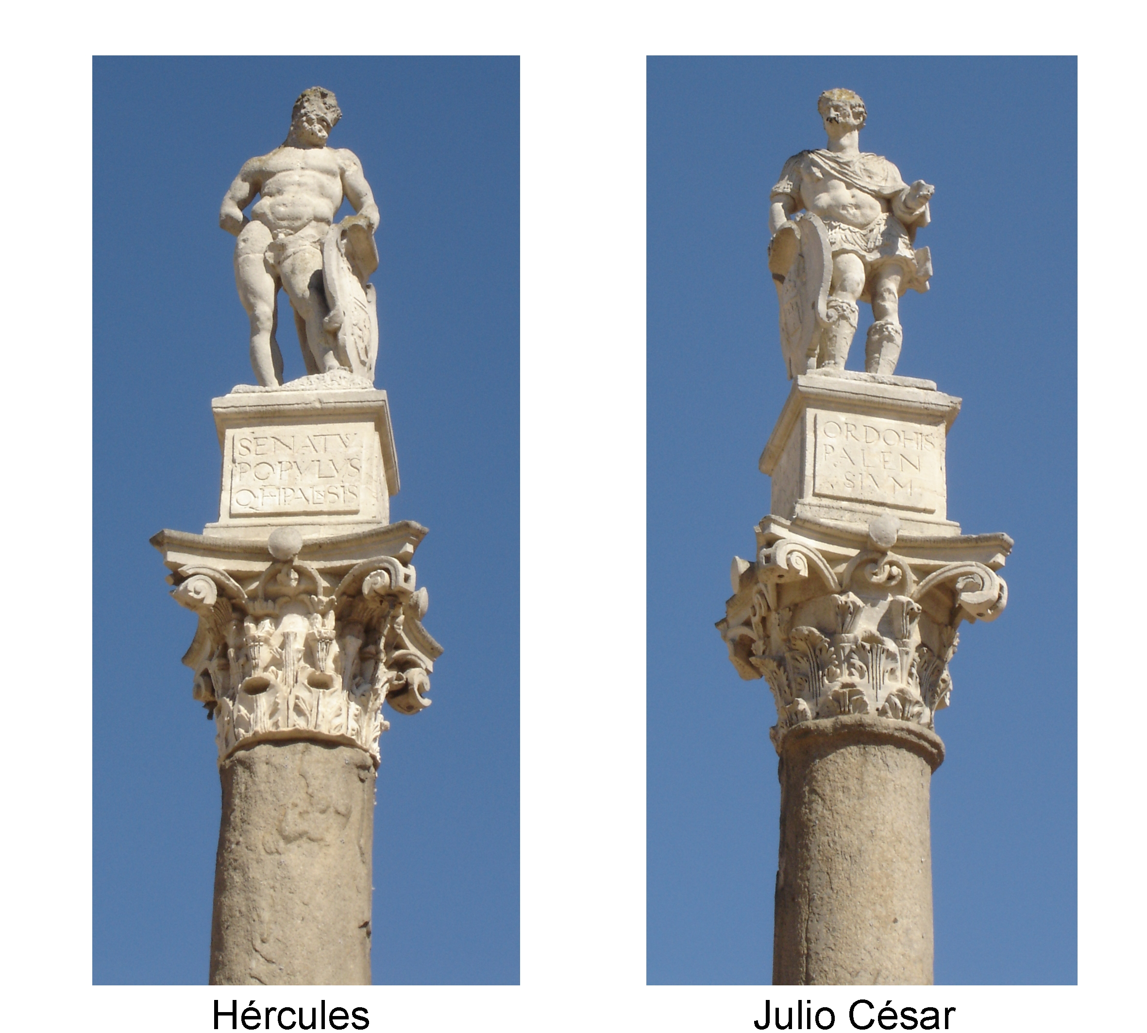 Columnas con las estatuas de Hércules y Julio César en la "Alameda de Hércules" de Sevilla. Realización propia.